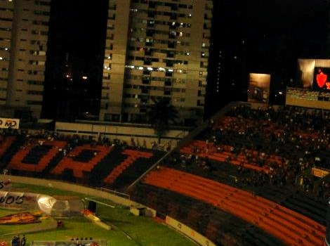 Estádio Adelmar da Costa Carvalho (Ilha do Retiro) - Recife, Pernambuco, Brasil.